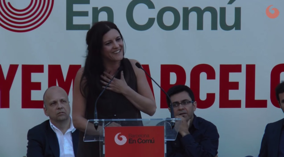 Marisa Matias en un acto de Barcelona en Comú.